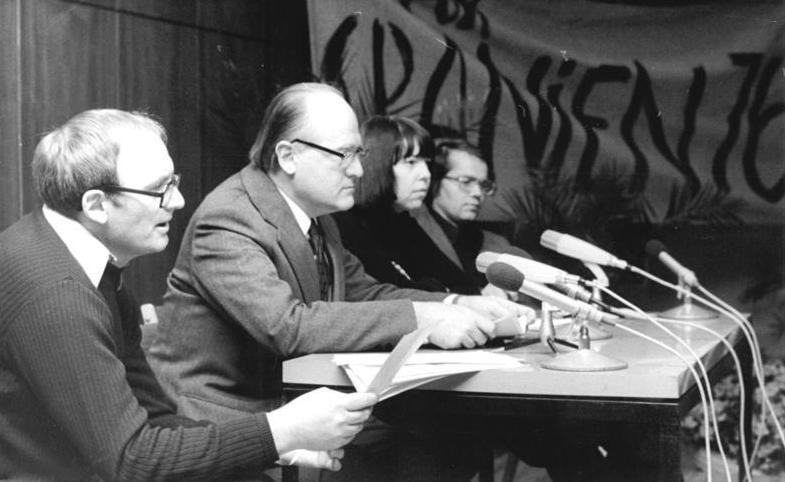 ADN-ZB Stark 25.3.76 Berlin: "Für Spanien 76" - unter diesem Motto fand am 24.3.76 in der Berliner Stadtbibliothek eine Solidaritätsveranstaltung des DDR-Schriftstellerverbandes für das kämpfende spanische Volk statt. Namhafte Schriftsteller wie Hermann Kant, Eduard Klein, Sarah Kirsch und Volker Braun (v.l.n.r.) lasen Verse und Prosa spanischer Autoren, deren Werke im Kampf gegen Faschismus und Diktatur entstanden. Im Anschluß an die Lesung konnten die Besucher Plakate erwerben und diese von den anwesenden Schriftstellern signieren lassen. (siehe auch R0325-29N)